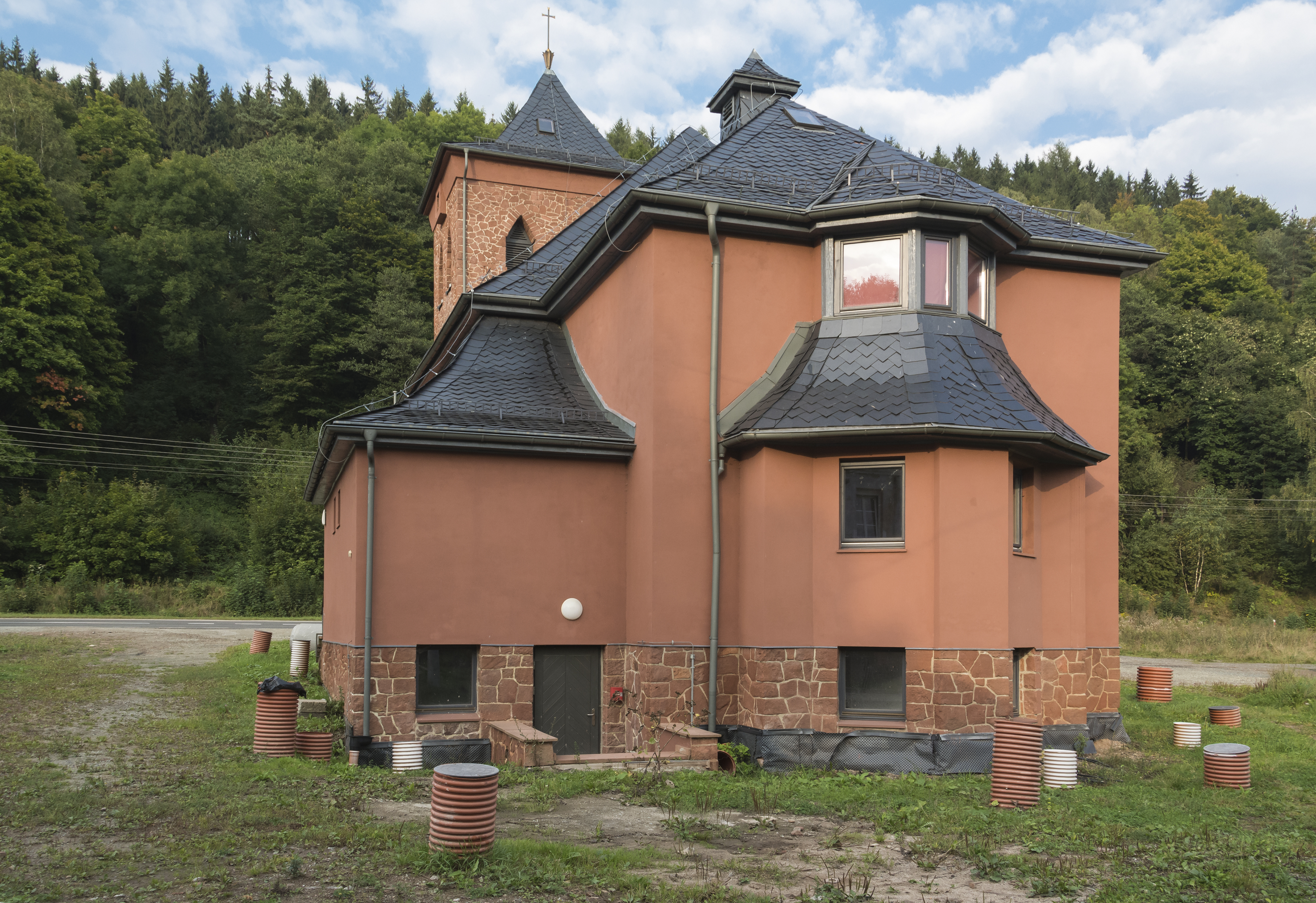 Ludwikowice Kłodzkie, kościół ewangelicki p.w. Błogosławieństwa Pańskiego, ob. Muzeum Ziemi Sowiogórskiej, 1929-1930